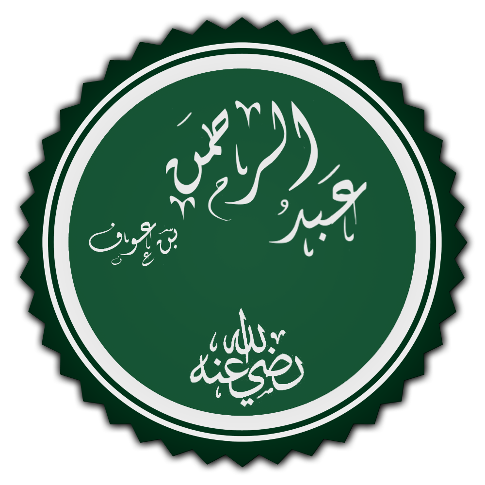 رسم زخرفي لاسم عبد الرحمن بن عوف رضي اللع عنه